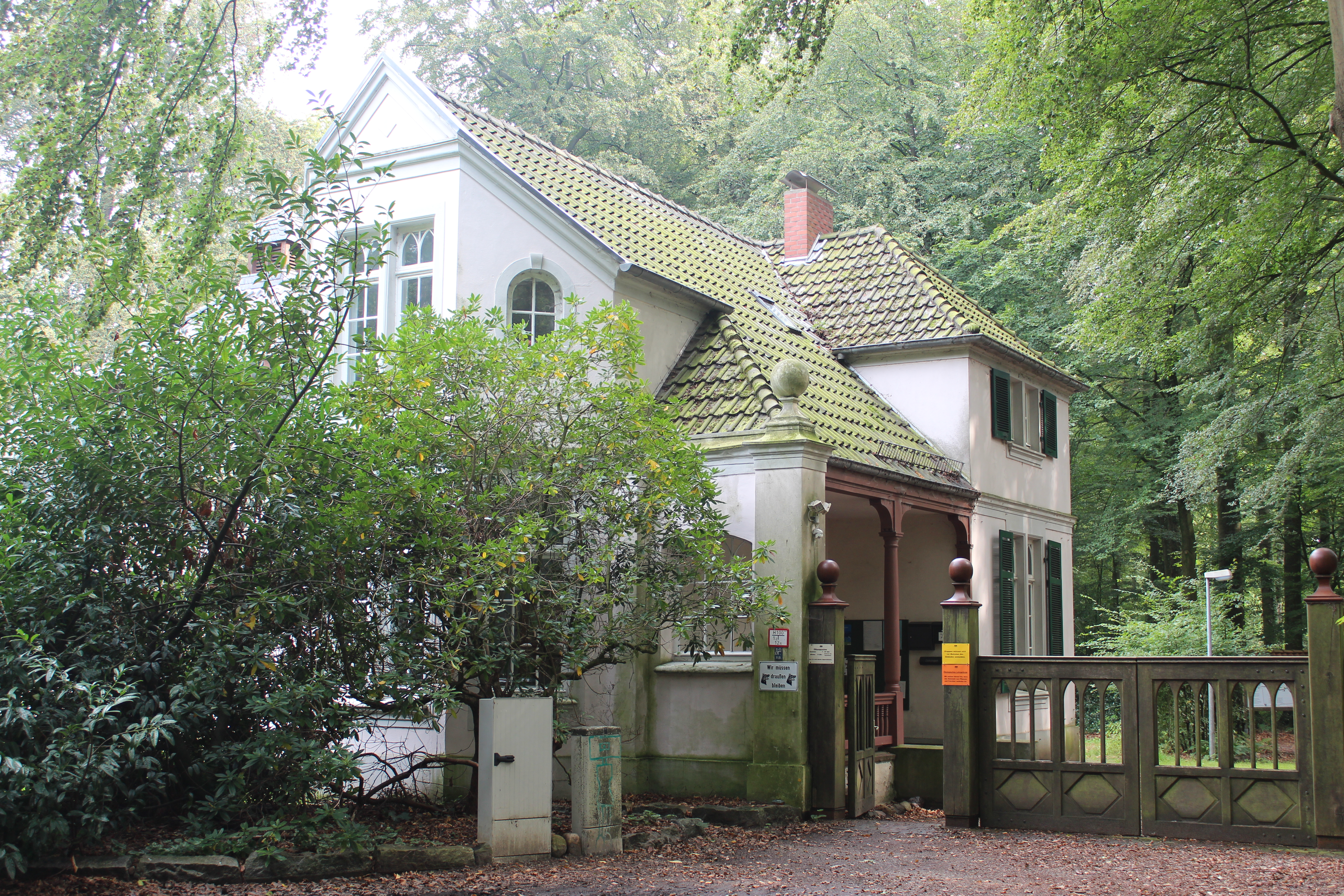 Landhaus Lamotte, Hofmeierhaus, Ökologiestation in Bremen, Am Güthpol 11.Das abgebildete Objekt ist ein geschütztes Kulturdenkmal in der Freien Hansestadt Bremen, mit der Nr. 1654 beim Landesamt für Denkmalpflege registriert.